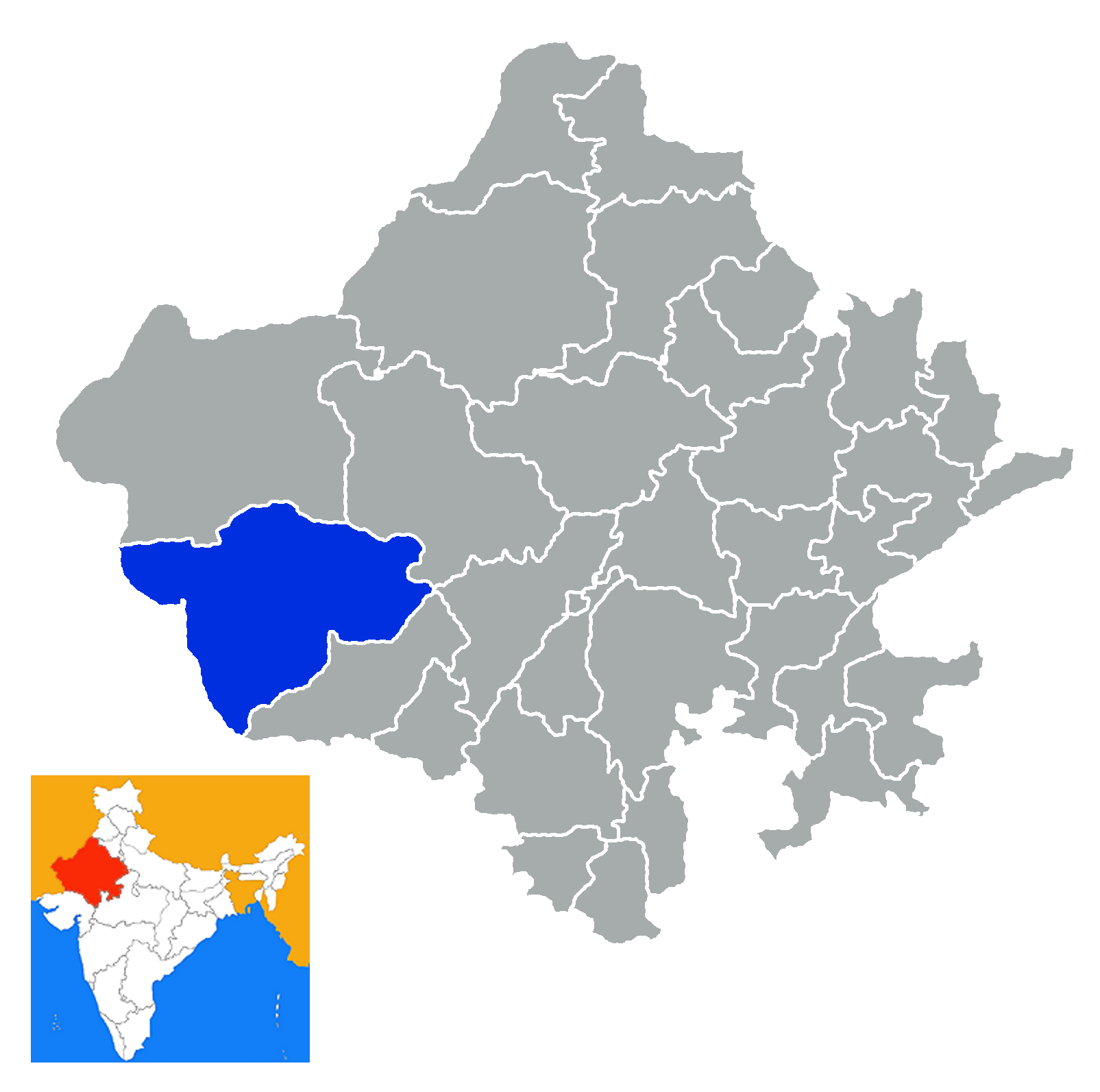 Distrito de Barmer Rajastan India